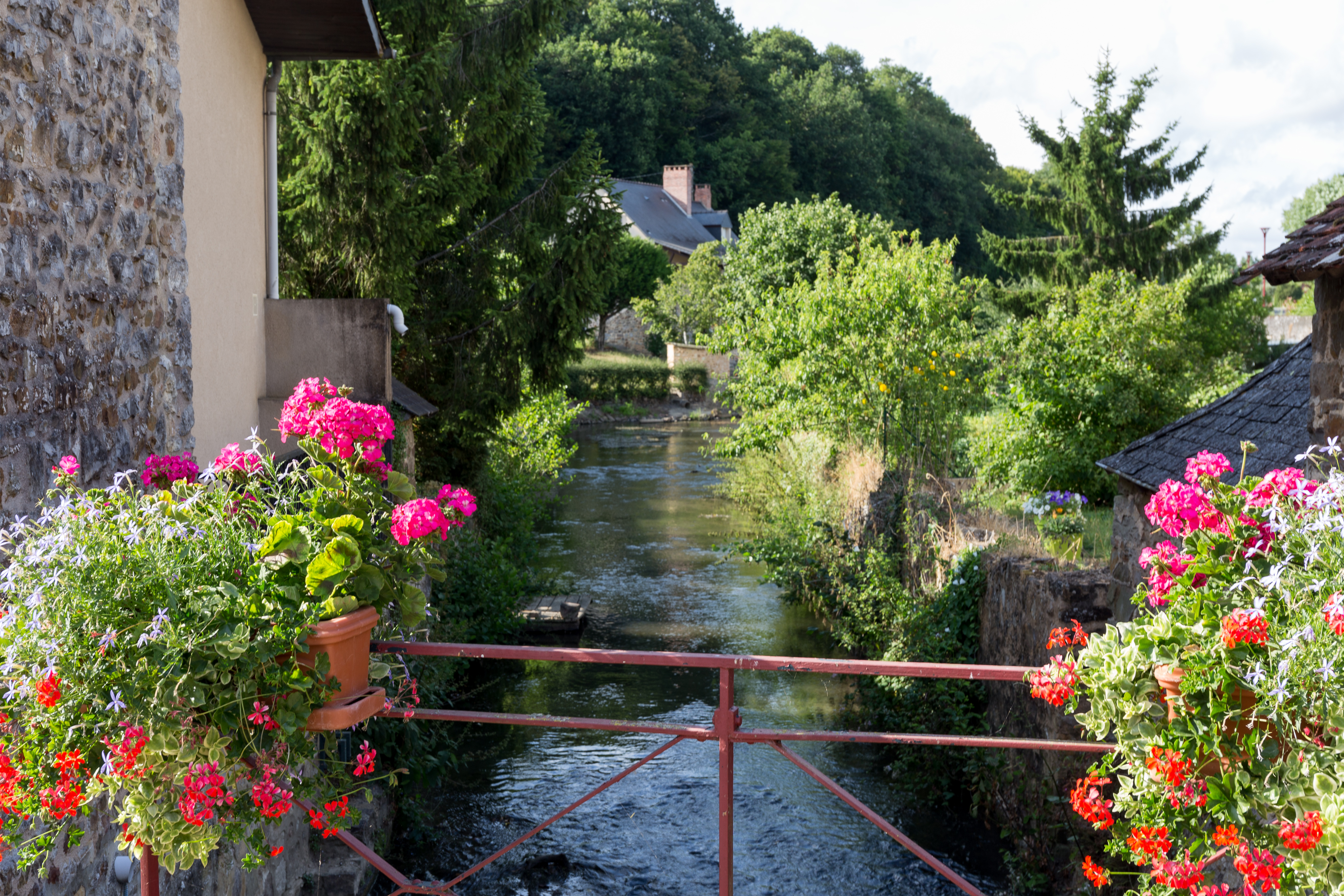 L'Erve à Saint-Jean-sur-Erve.